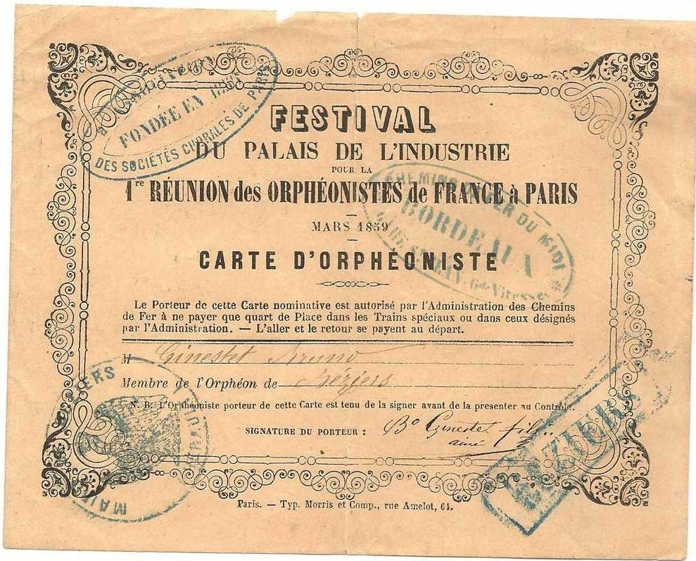 Carte de réduction pour les chemins de fer pour venir participer au premier grand festival des orphéonistes à Paris en 1859.